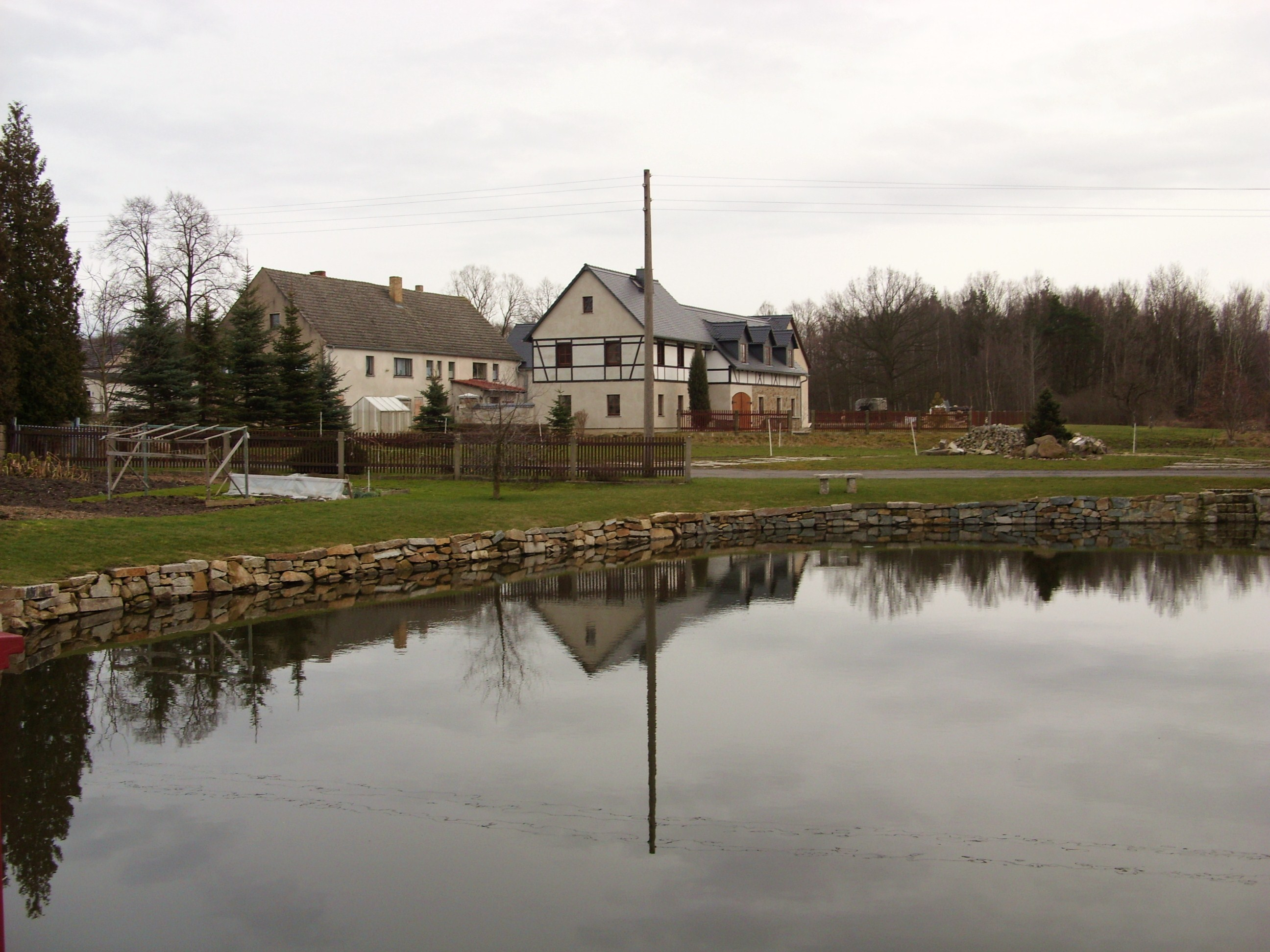 Teich in Caßlau, Gemeinde Neschwitz, Landkreis Bautzen. Hornjoserbsce: Hat w Koslowje, gmejna Njeswačidło, wokrjes Budyšin.